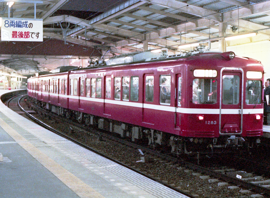 京浜急行 1000形電車 1283